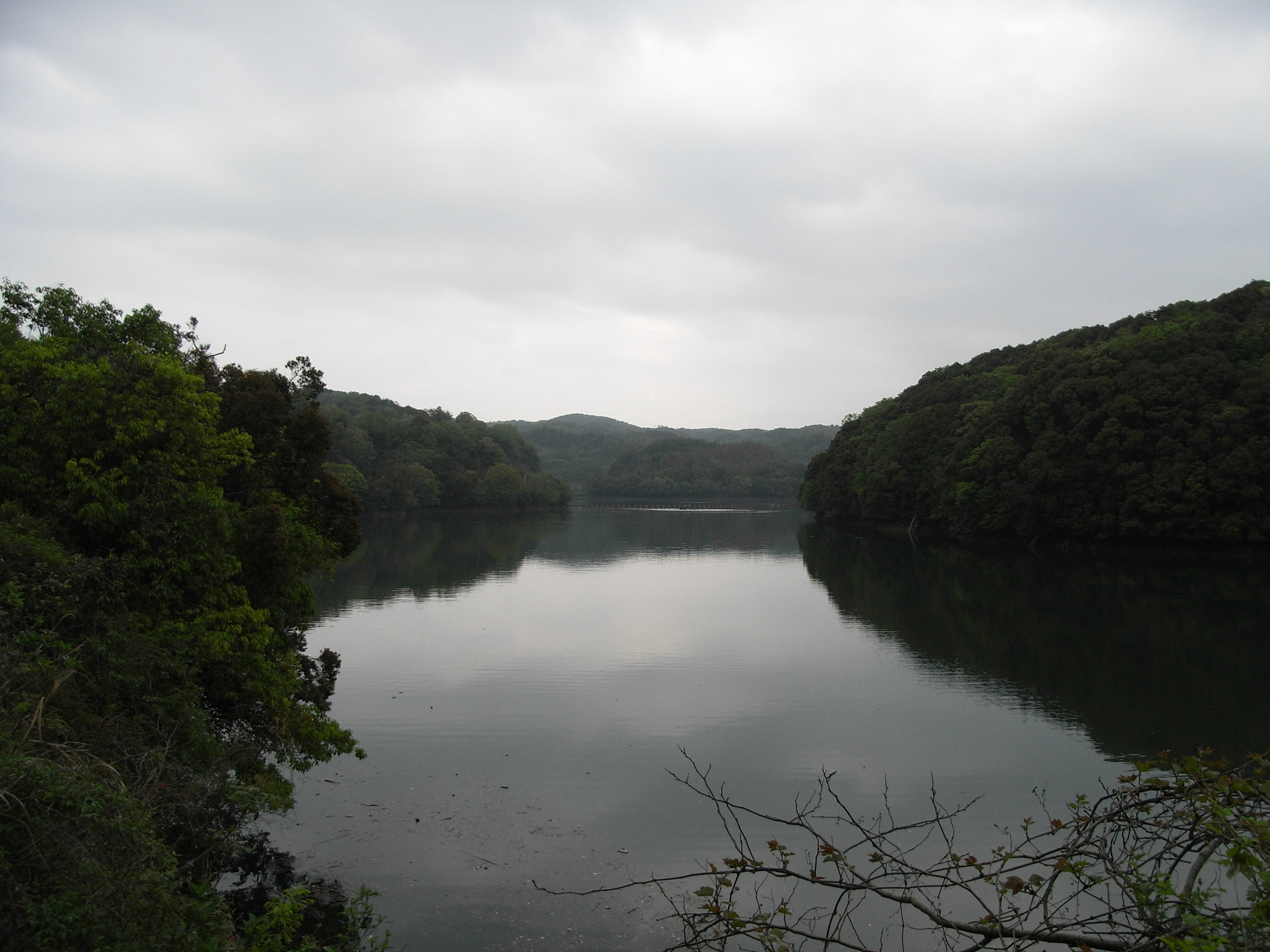 Lake